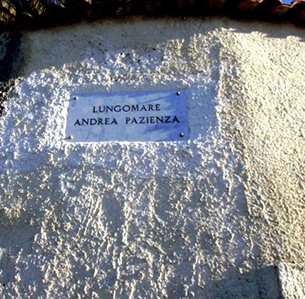 Targa toponomastica del Lungomare dedicato ad Andrea Pazienza a San Menaio (FG)